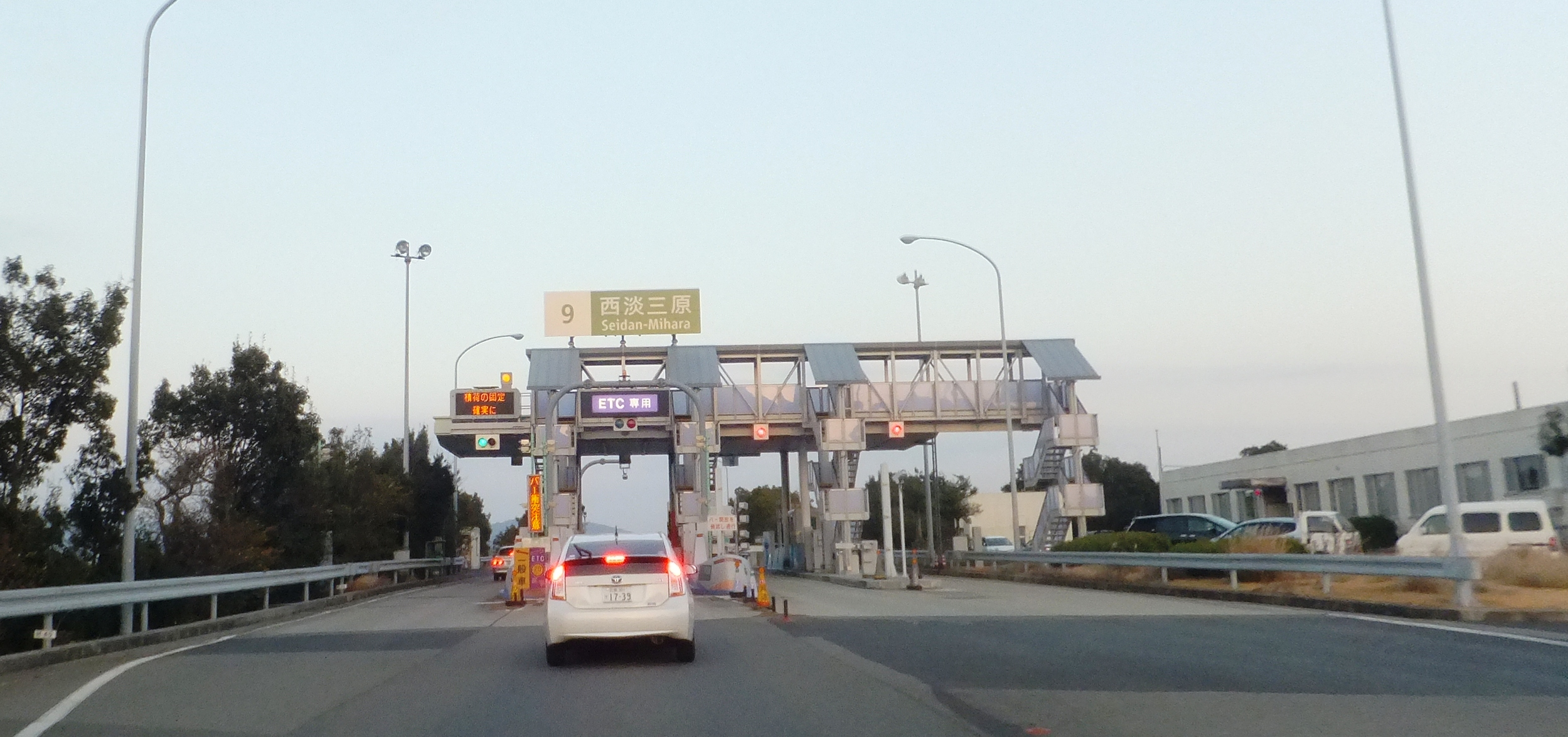 西淡三原インターチェンジ